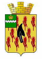 Герб Воротынска (с короной), Калужская область